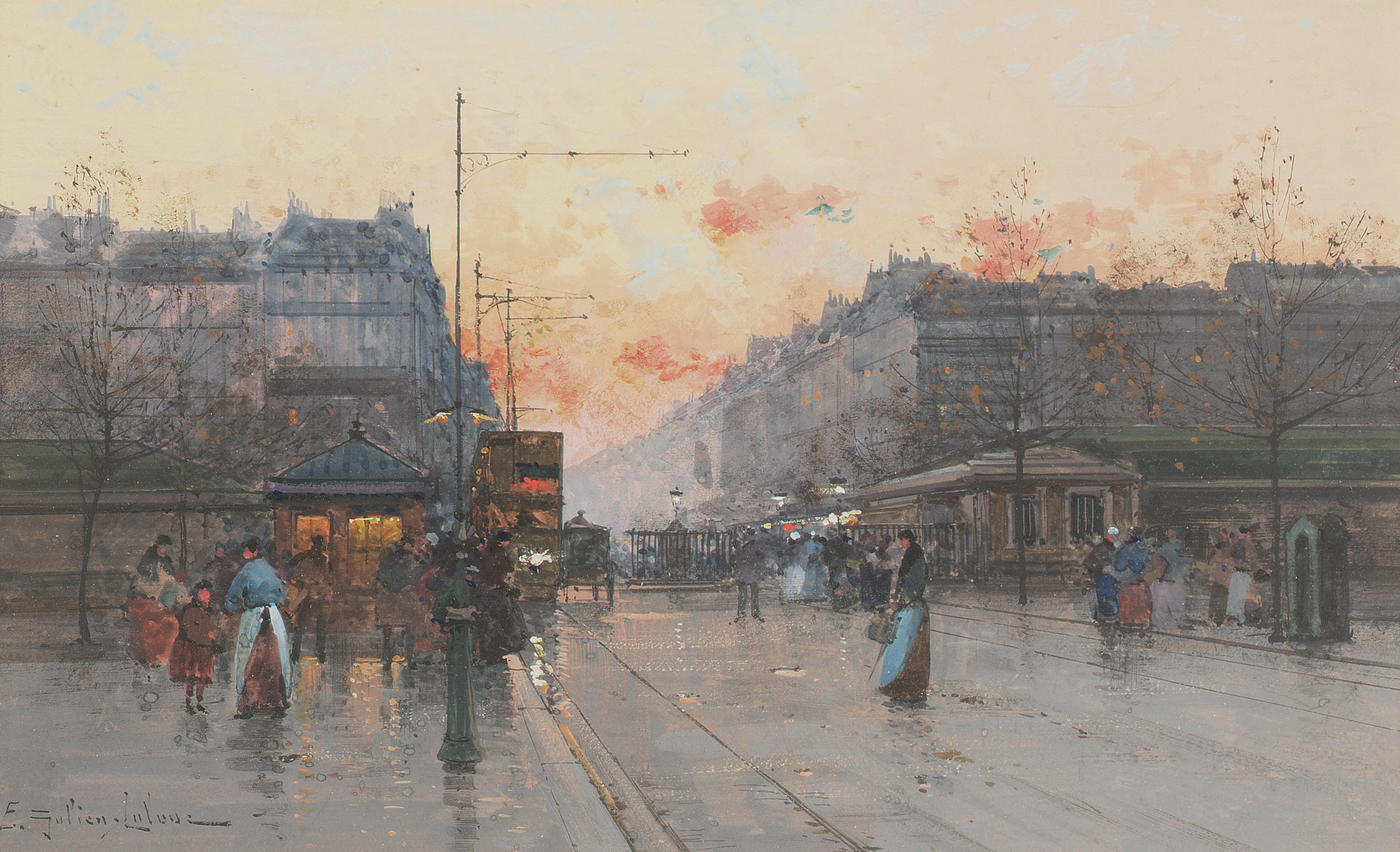 Paris, Porte de Chatillon.